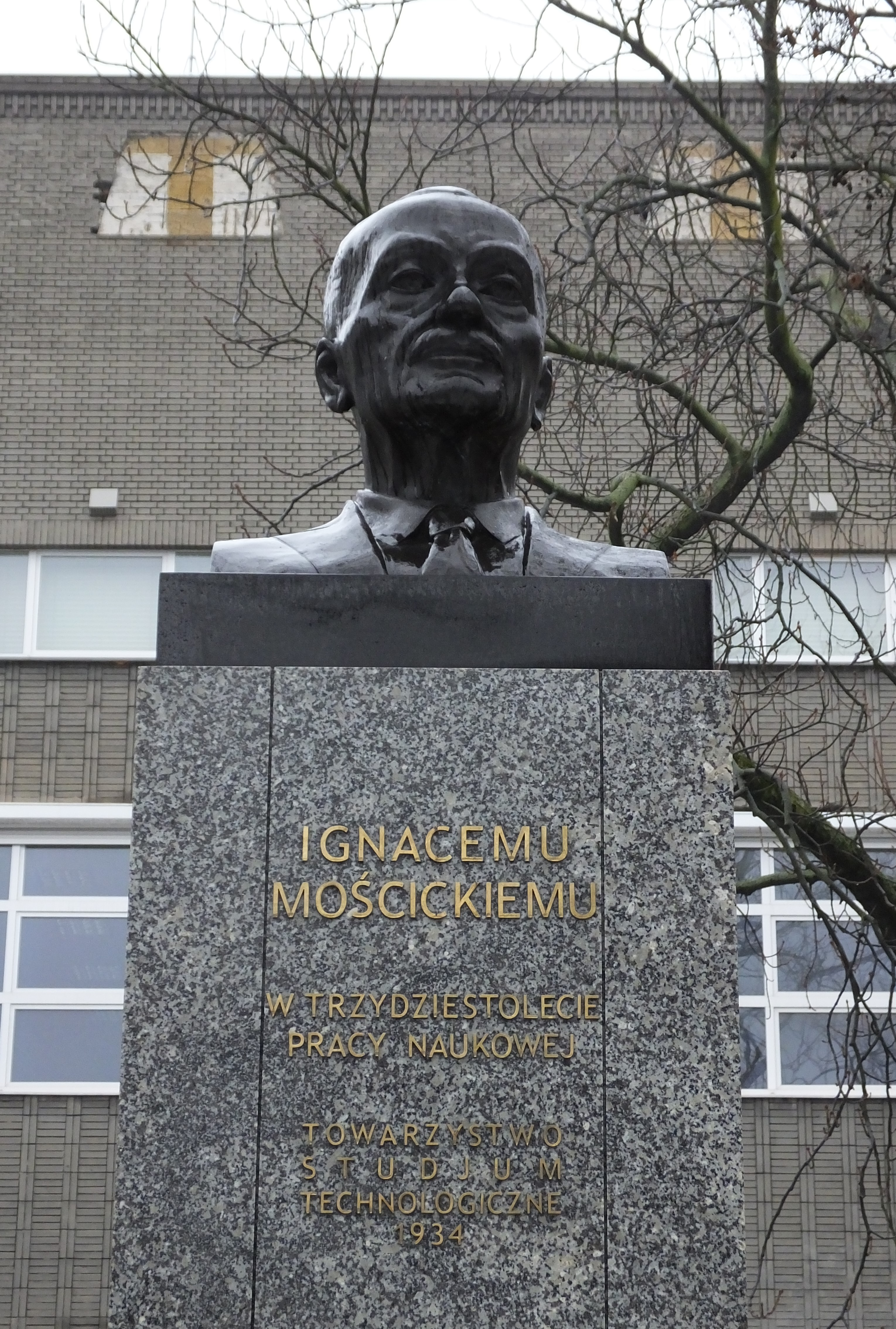 Pomnik Ignacego Mościckiego znajdujący się na dziedzińcu przed Gmachem Technologii Chemicznej Politechniki Warszawskiej odnowiony w 2018 r.